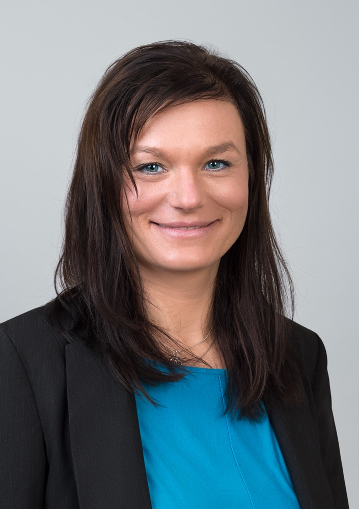 Portraitaufnahme von Susanne Wendland, Mitglied der Bremischen Bürgerschaft